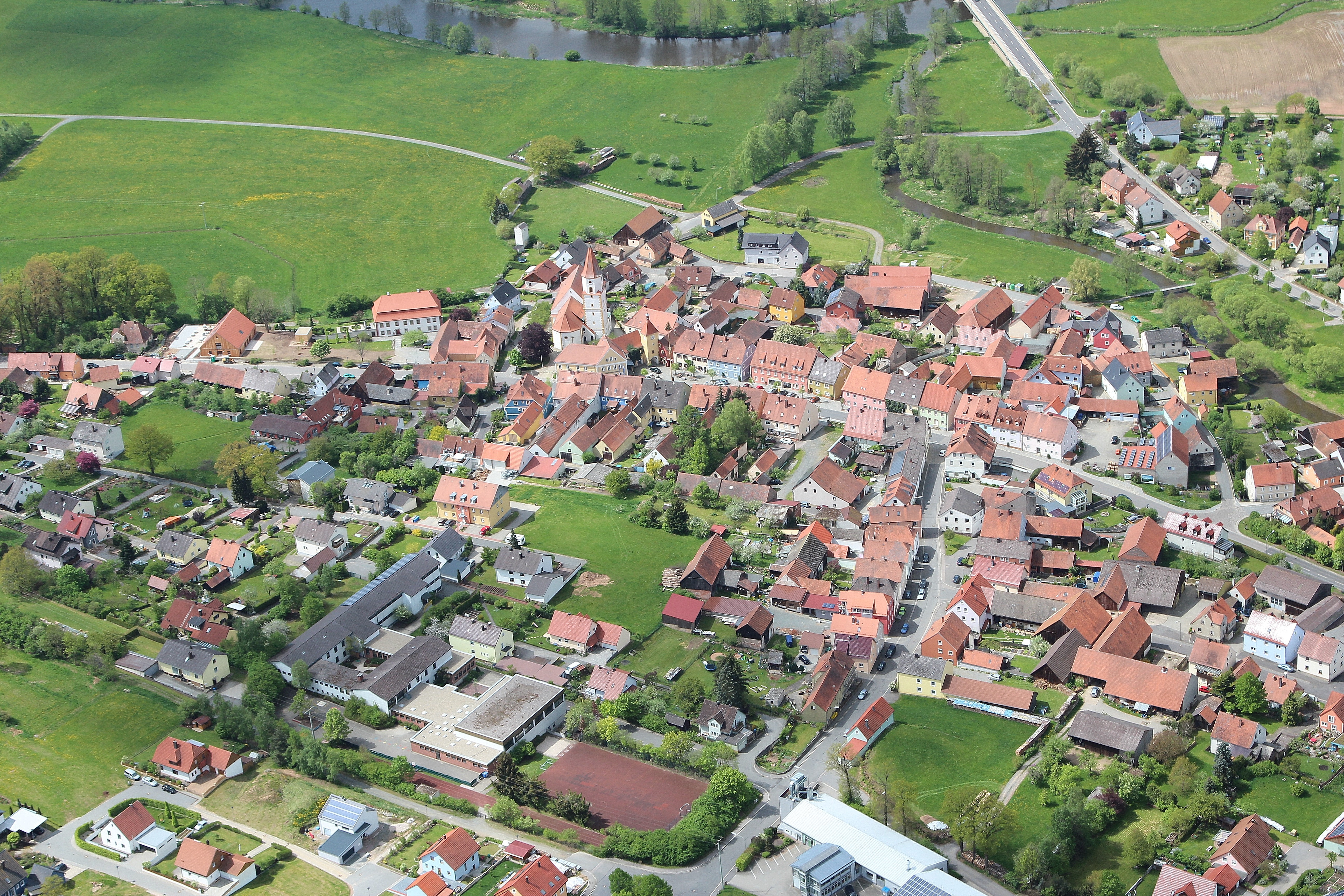 Luhe Wildenau (10. Mai 2015)